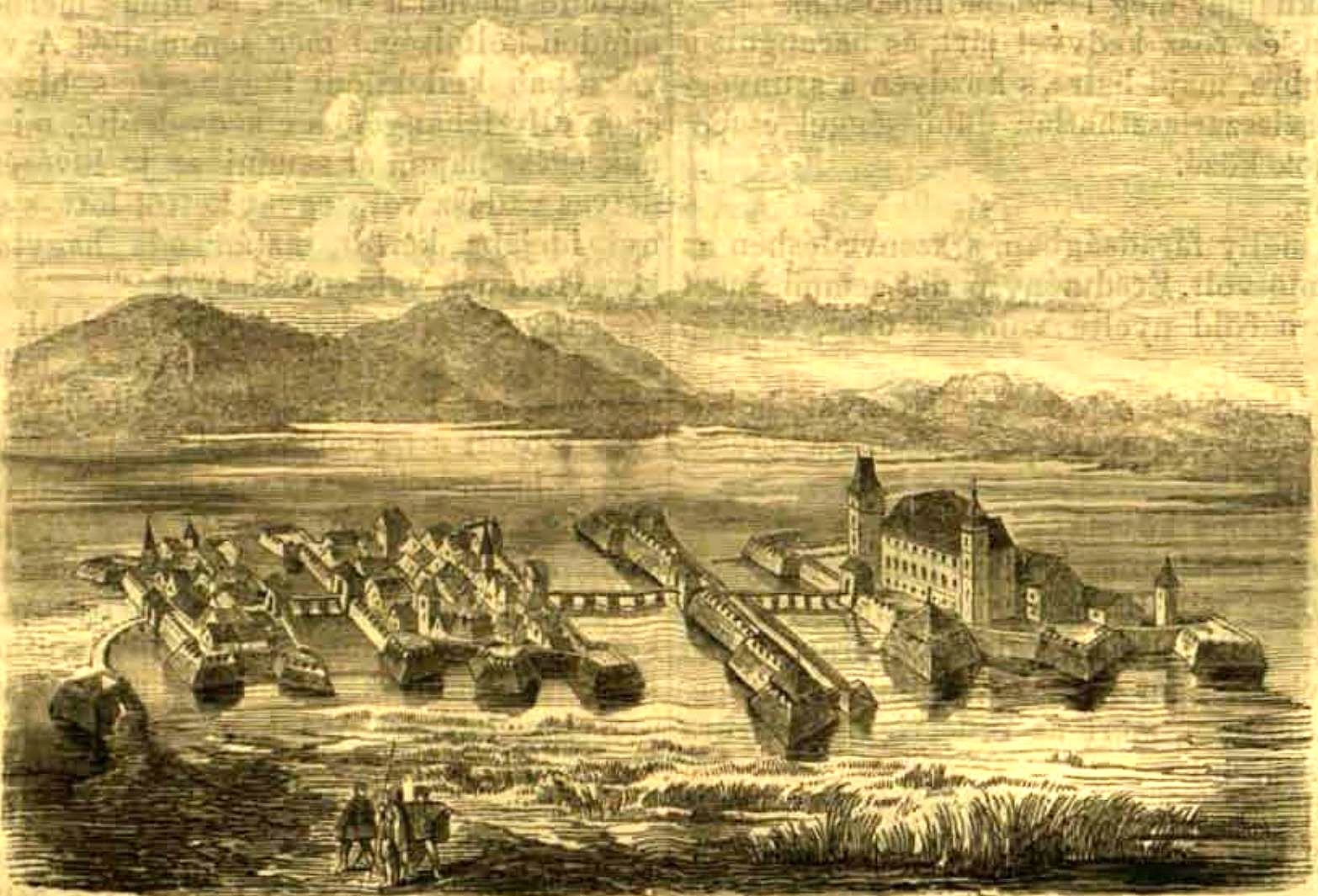 Az ecsedi tó és régi vára.